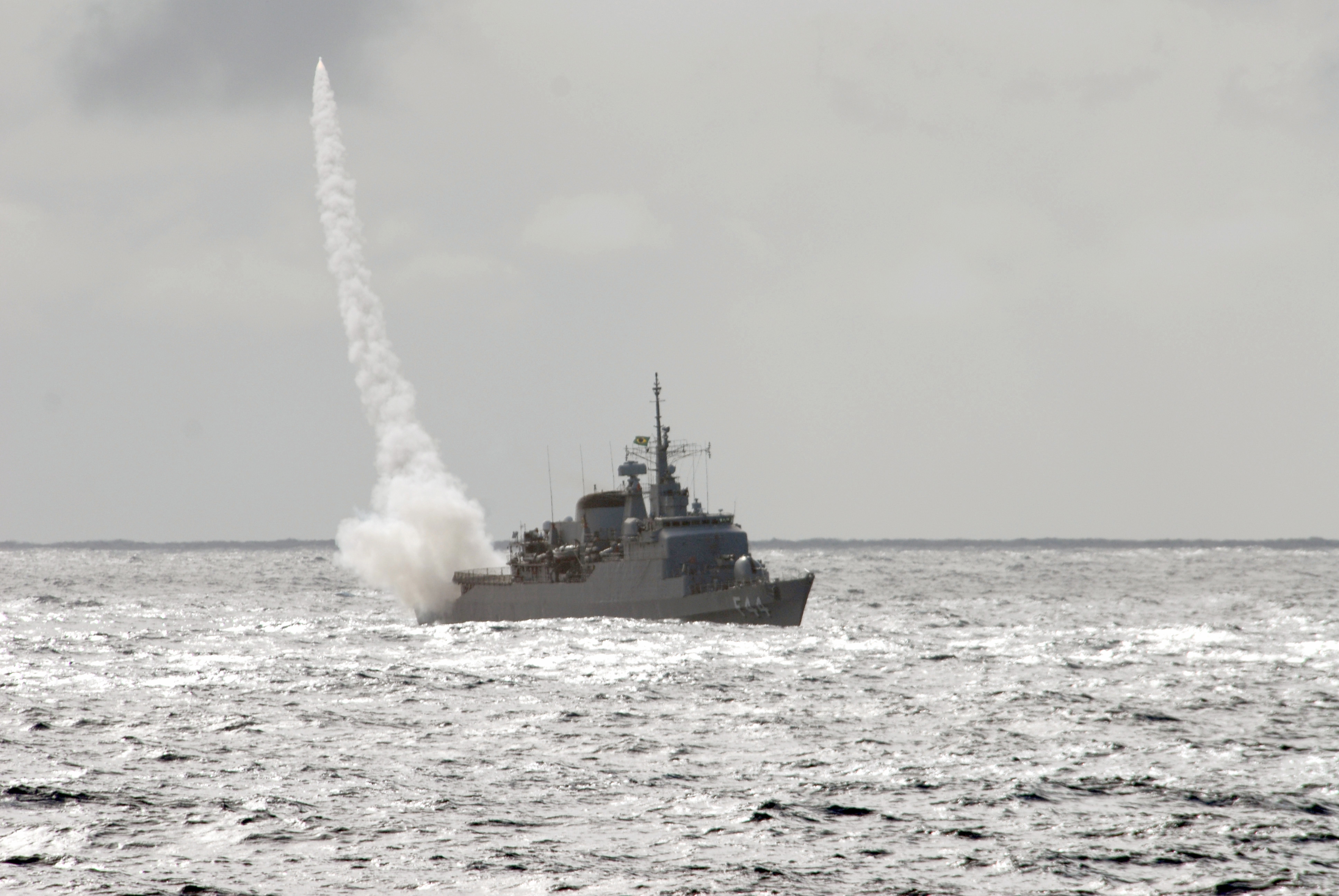 Arquivo liberado pela Marinha do Brasil através de projeto GLAM com Wiki Educação Brasil